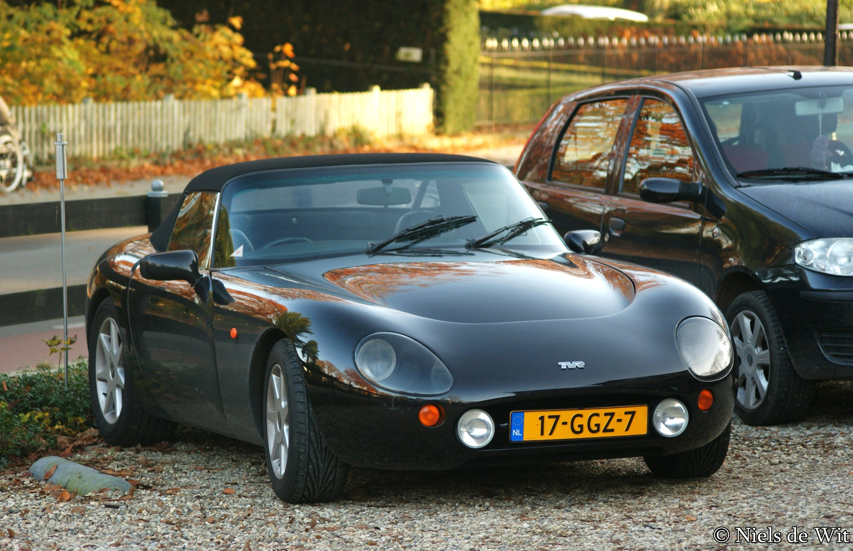 17-GGZ-7